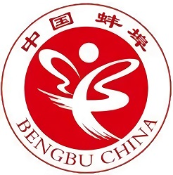 蚌埠城市形象标志